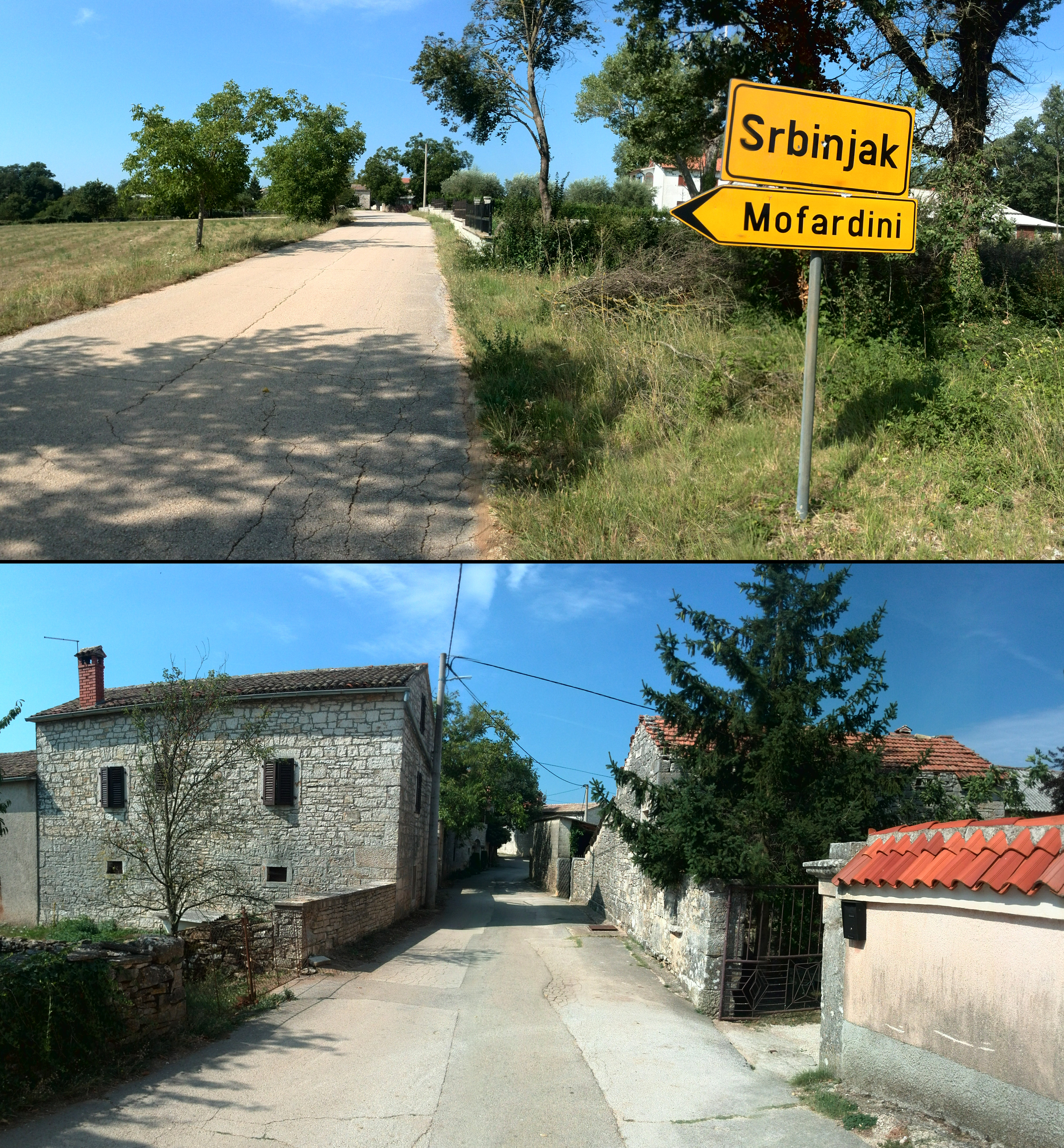 Srpski (latinica): Srbinjak, opština Tinjan (Istra)